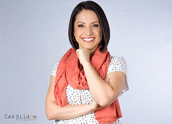 Sesión fotográfica de Tuti Furlán 2015